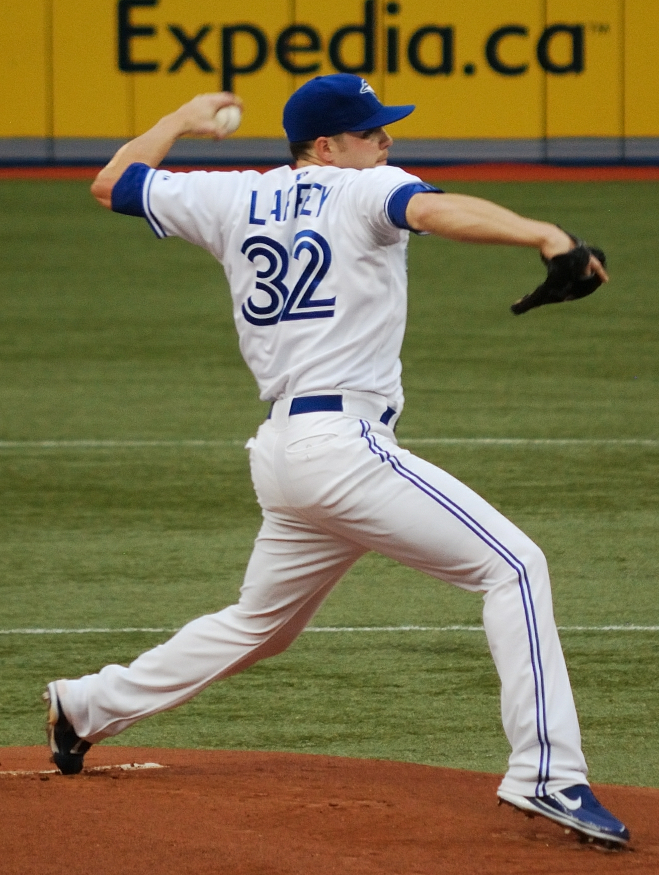 Aaron Laffey